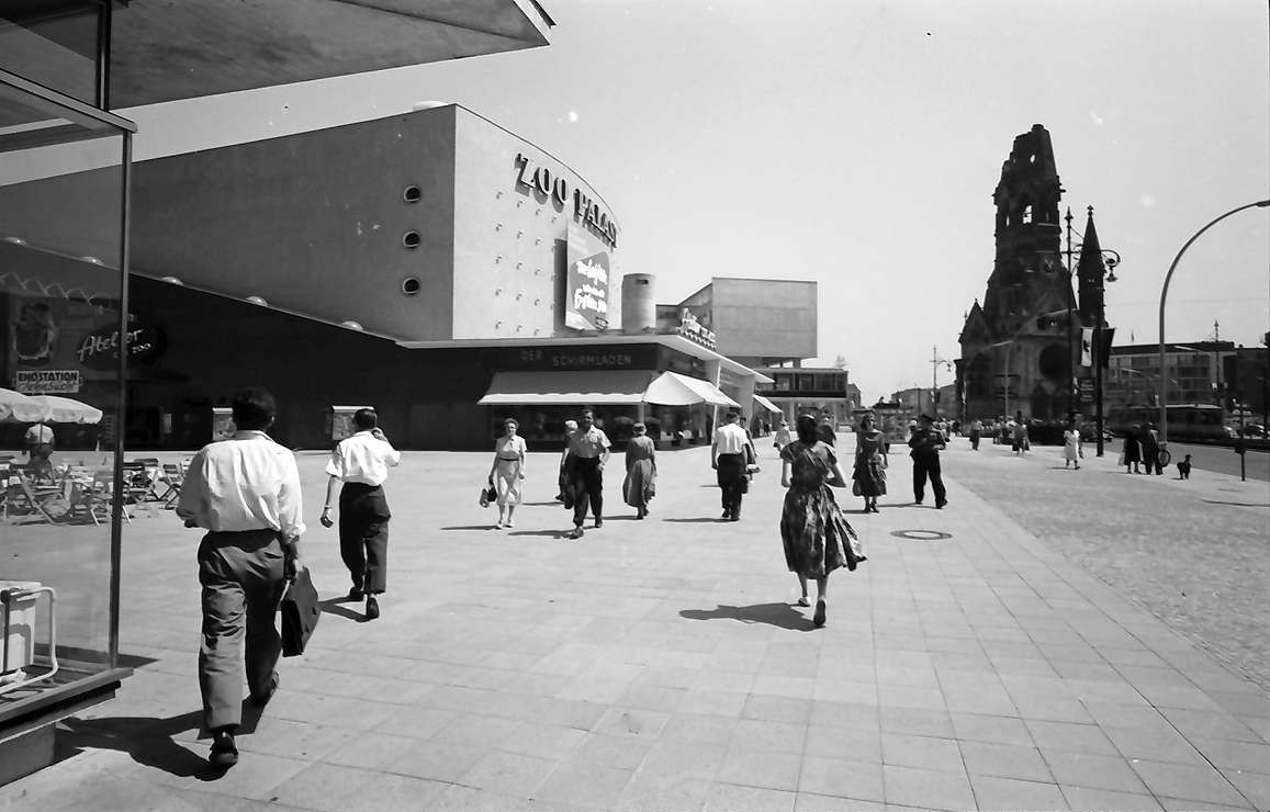 Zoo Palast und Kaiser-Wilhelm-Gedächtniskirche in Berlin-Charlottenburg.